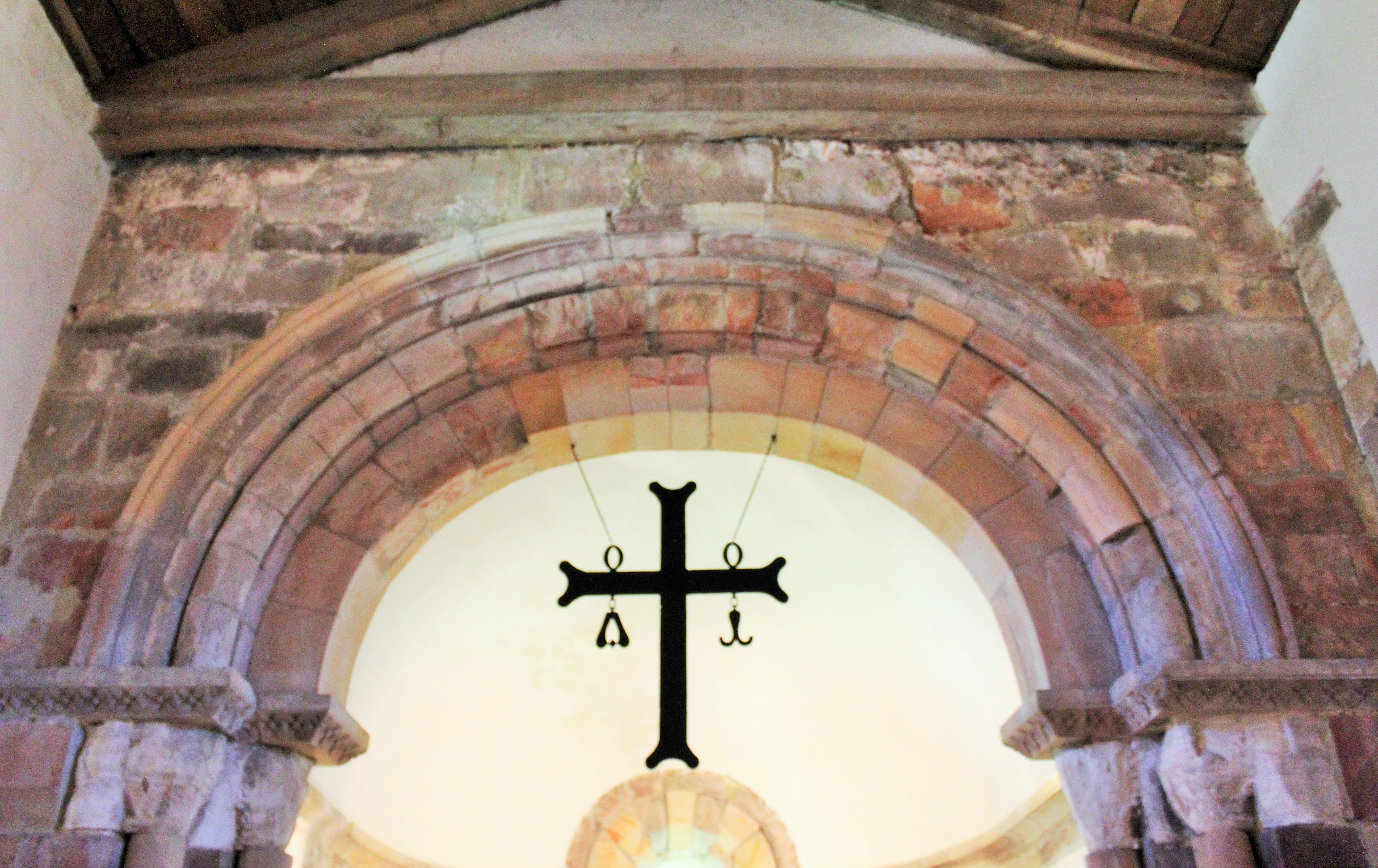 Arco presbiteral con los capiteles muy deteriorados a causa de un incendio en 1936